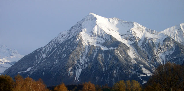 Der Niesen, von Thun aus gesehen.